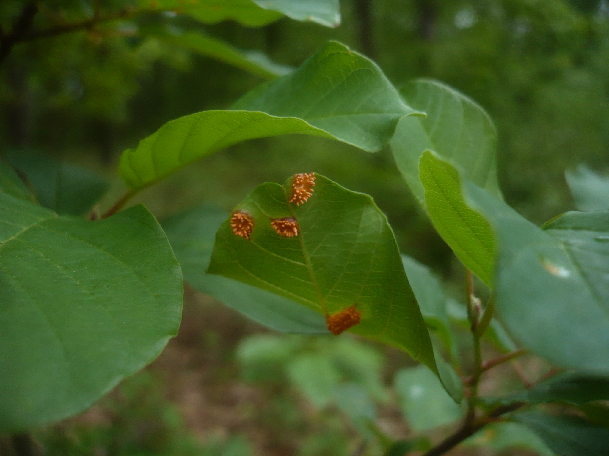 Puccinia coronata on Frangula alnus